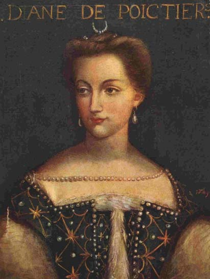 Diane de Poitiers